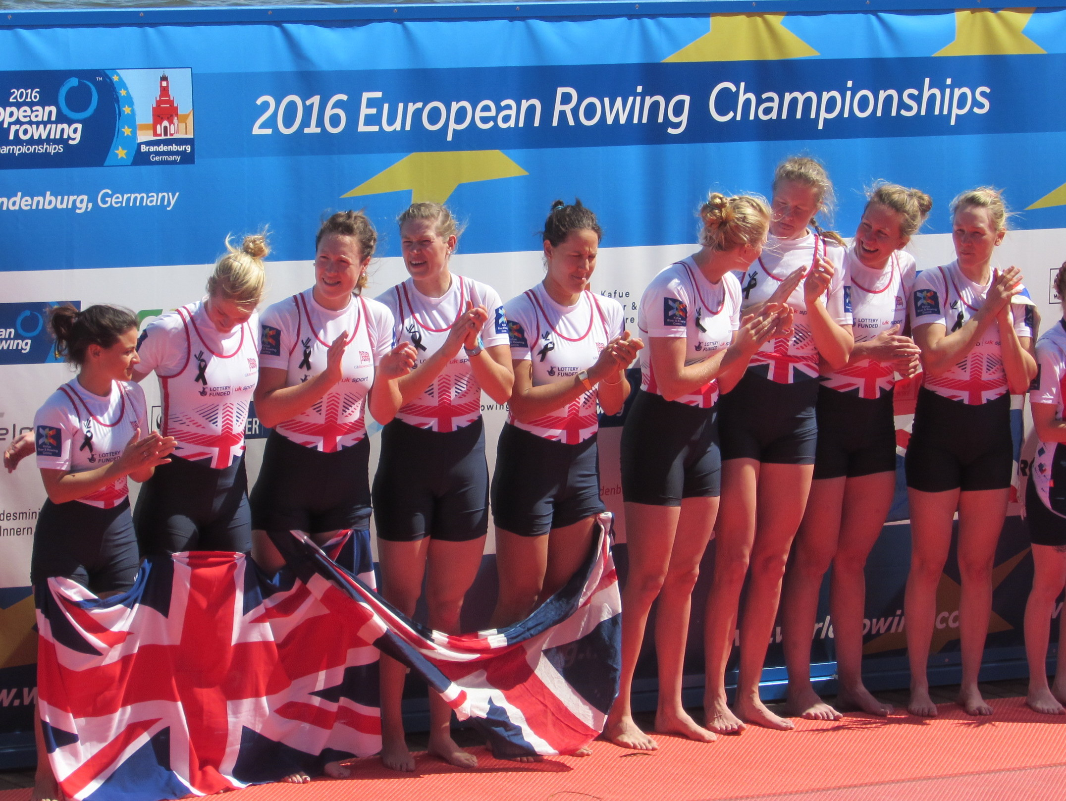 Ruder-EM 2016: (ungeordnet) Katie Greves, Melanie Wilson, Frances Houghton, Polly Swann, Jessica Eddie, Olivia Carnegie-Brown, Karen Bennett, Zoe Lee, Zoe de Toledo